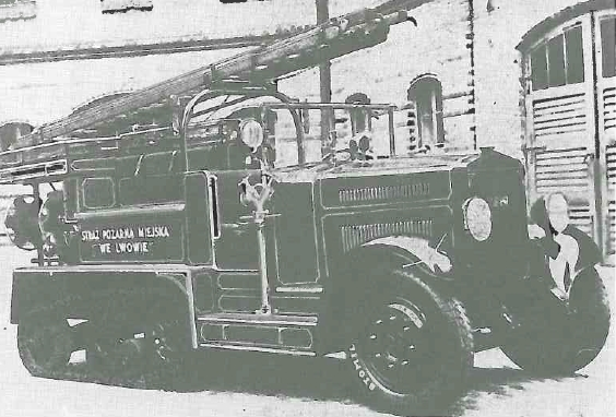 Samochód wz. 34 z karoserią wykonaną przez warsztaty "Unia Strażacka" we Lwowie dla miejskiej straży pożarnej